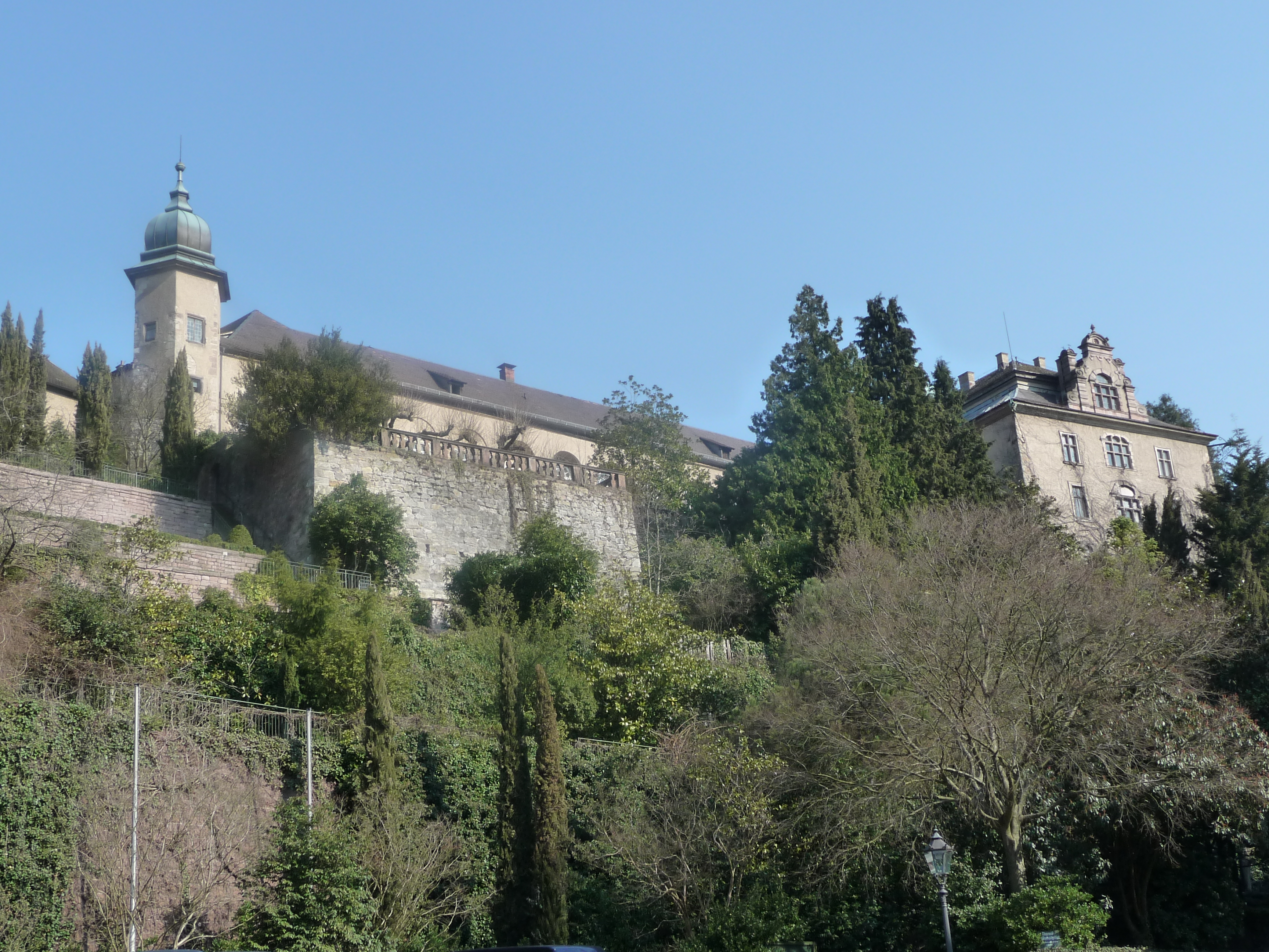 Blick vom Marktplatz auf das Neue Schloß in Baden-Baden (Baden-Württemberg, Deutschland)